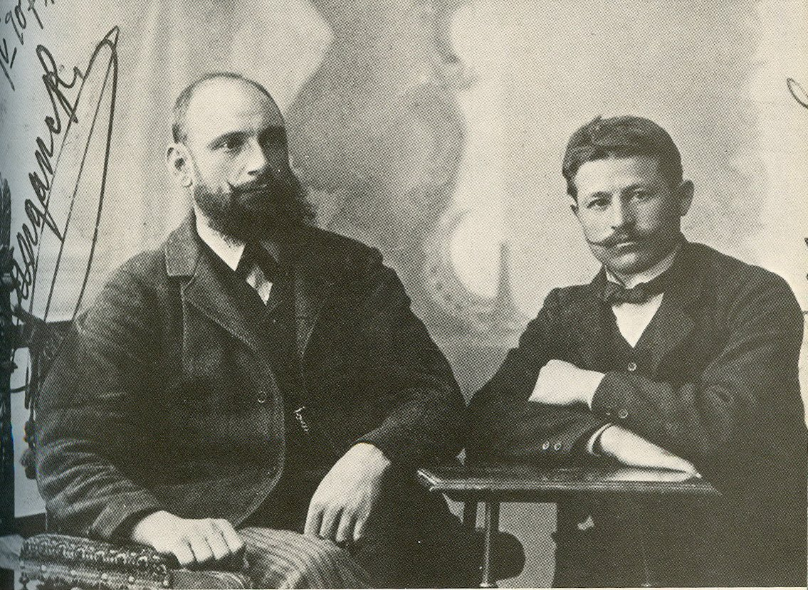 Яне Сандански и Таската Серски